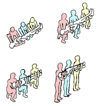 Relevage à la cuiller. Auteur : Christophe Dang Ngoc Chan (Cdang), dessin original numérisé et retouché avec un logiciel de dessin.